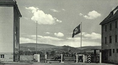 Langemarckkaserne Bad Hersfeld